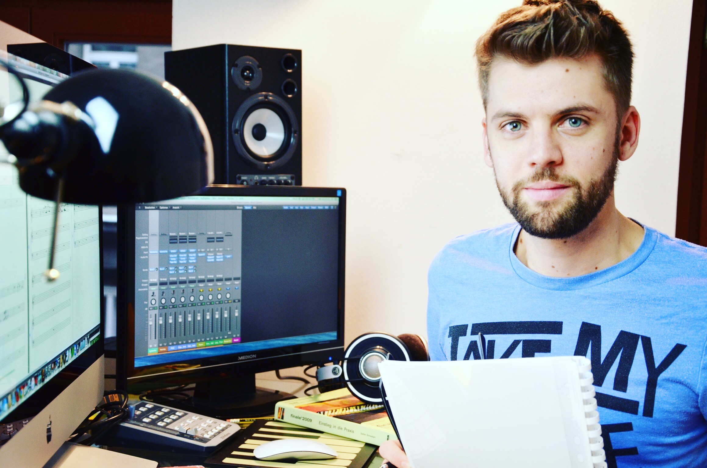 Daniel Feik - Protrait